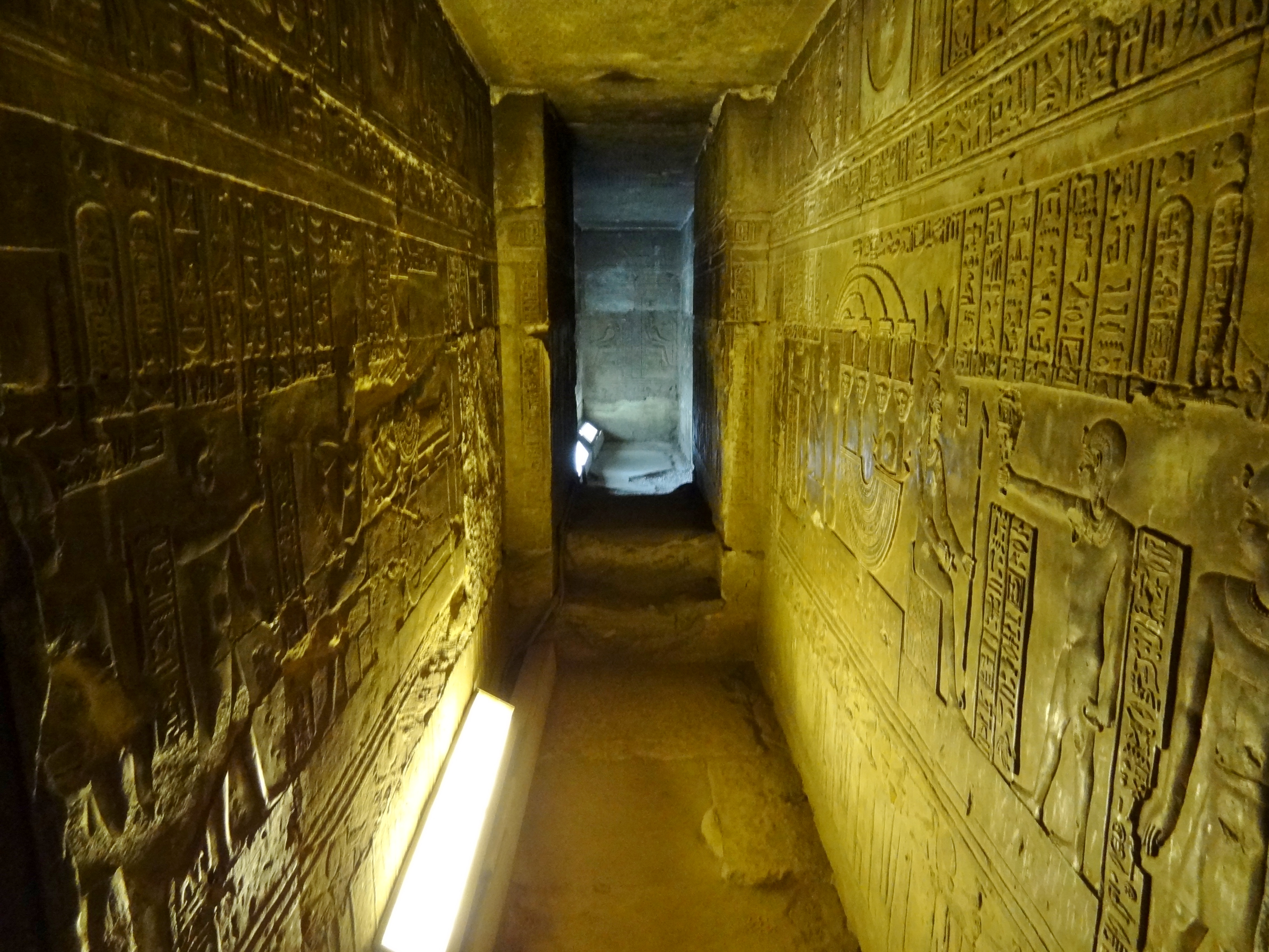 Krypta des Hathor-Tempels von Dendera, Ägypten